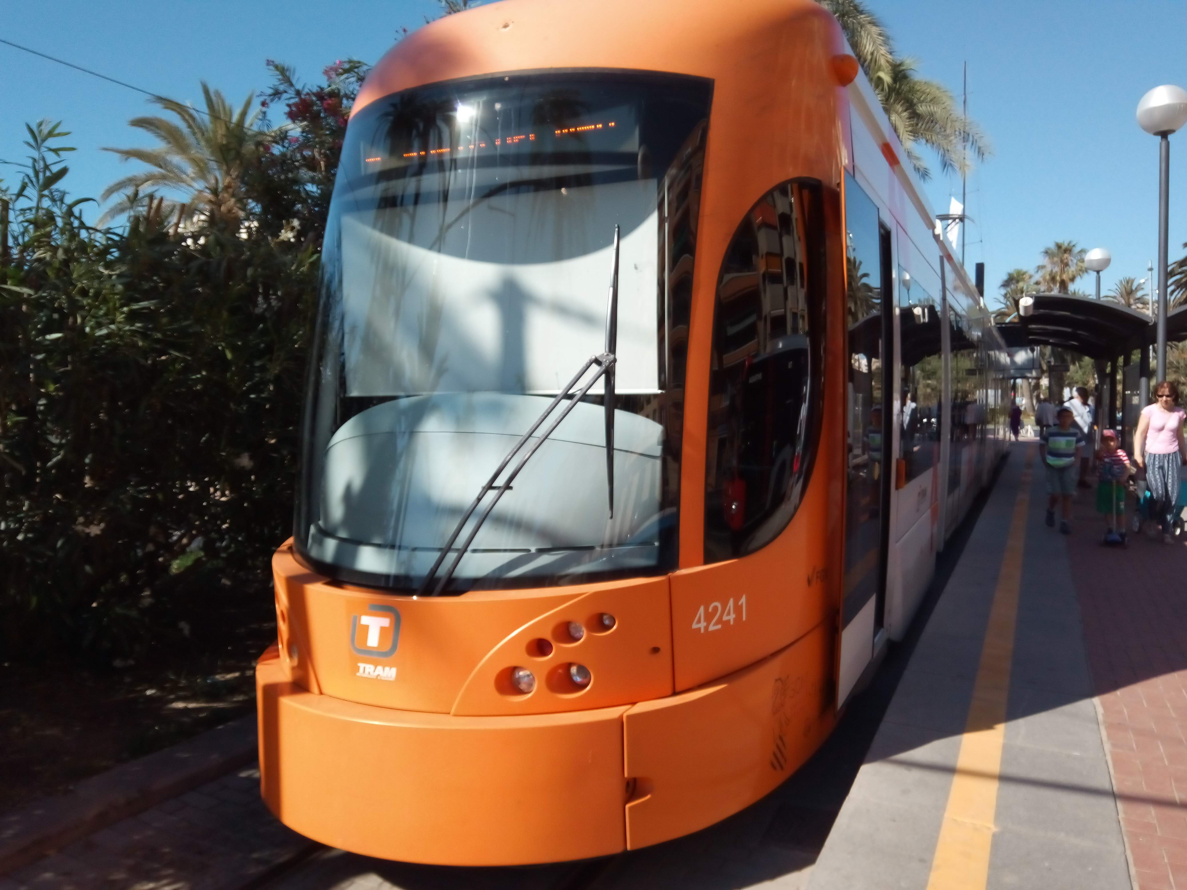 Un Tranvia Bombardier Flexity outlook Cityrunner 4200 en Puerta del Mar, a punto de salir hacia plaza Coruña.